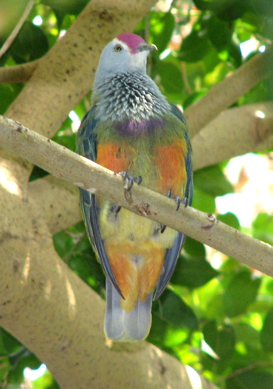 Mariana Fruit-dove (Ptilinopus roseicapilla), Louisville Zoo